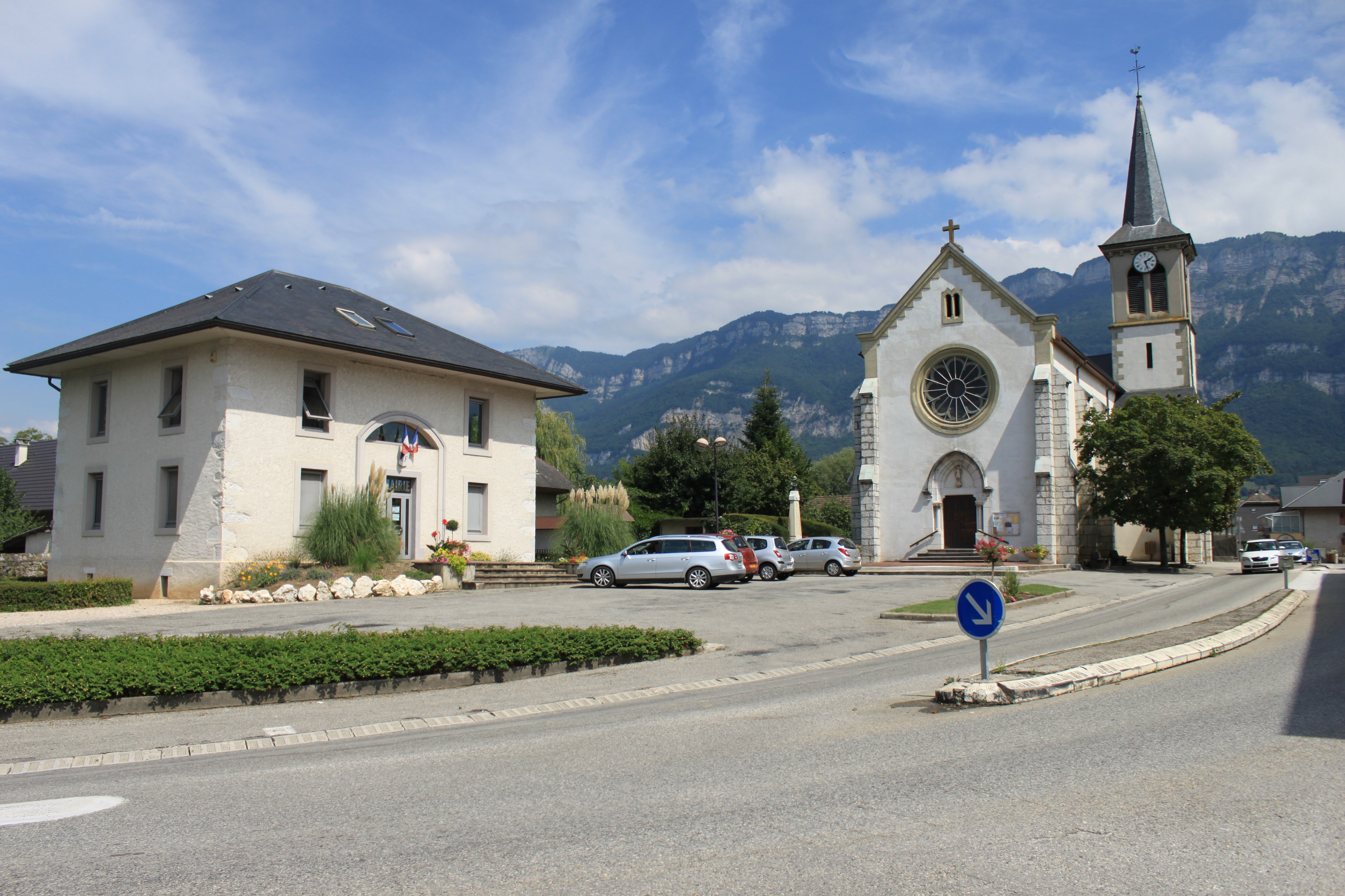 La Mairie et l'église de Viviers-du-Lac (Savoie)